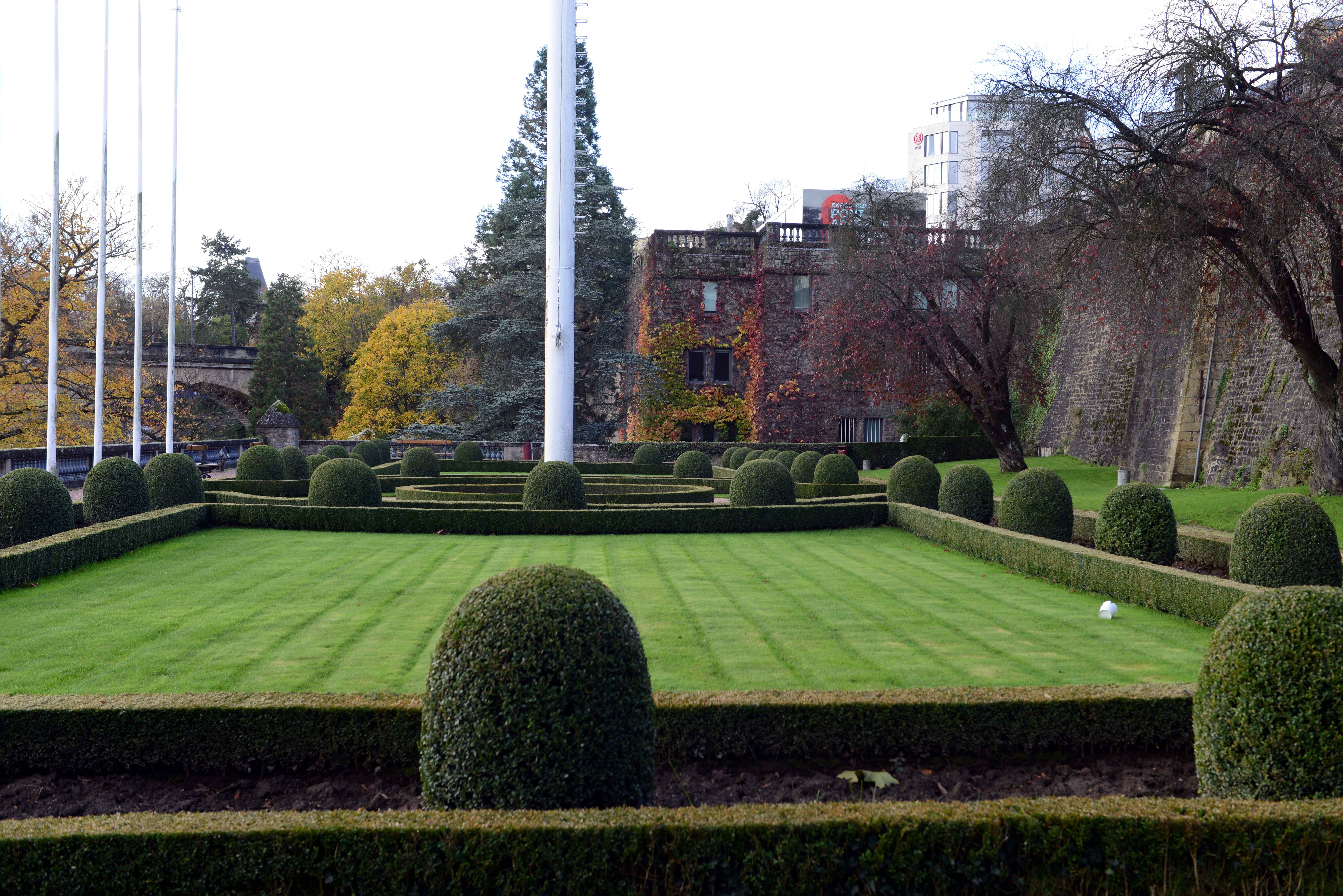 D'Fausse braie Beck-Jost.